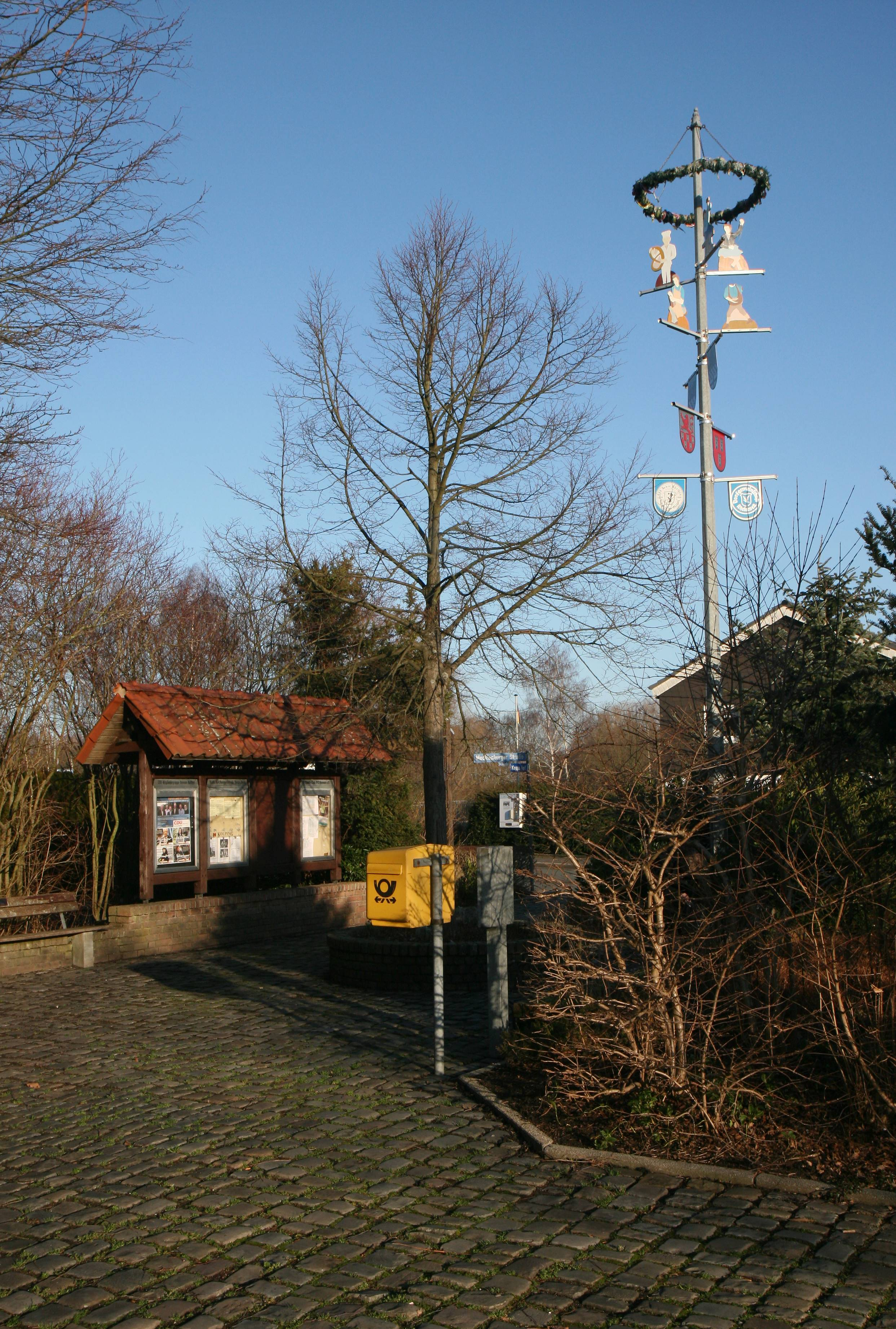 Maibaum in Iserlohn-Rheinen, Kepp's Hof.